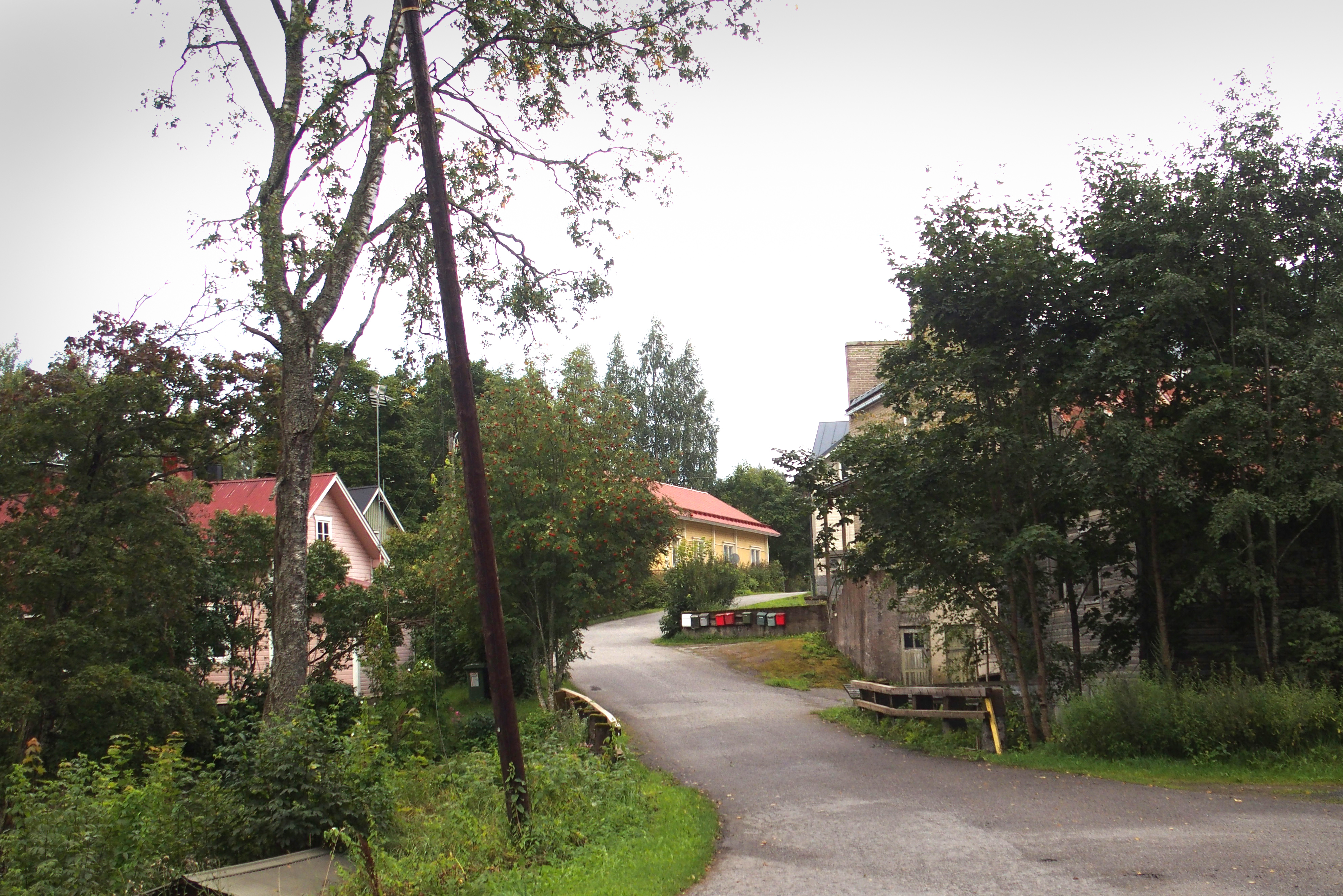 Arrakosken kylä